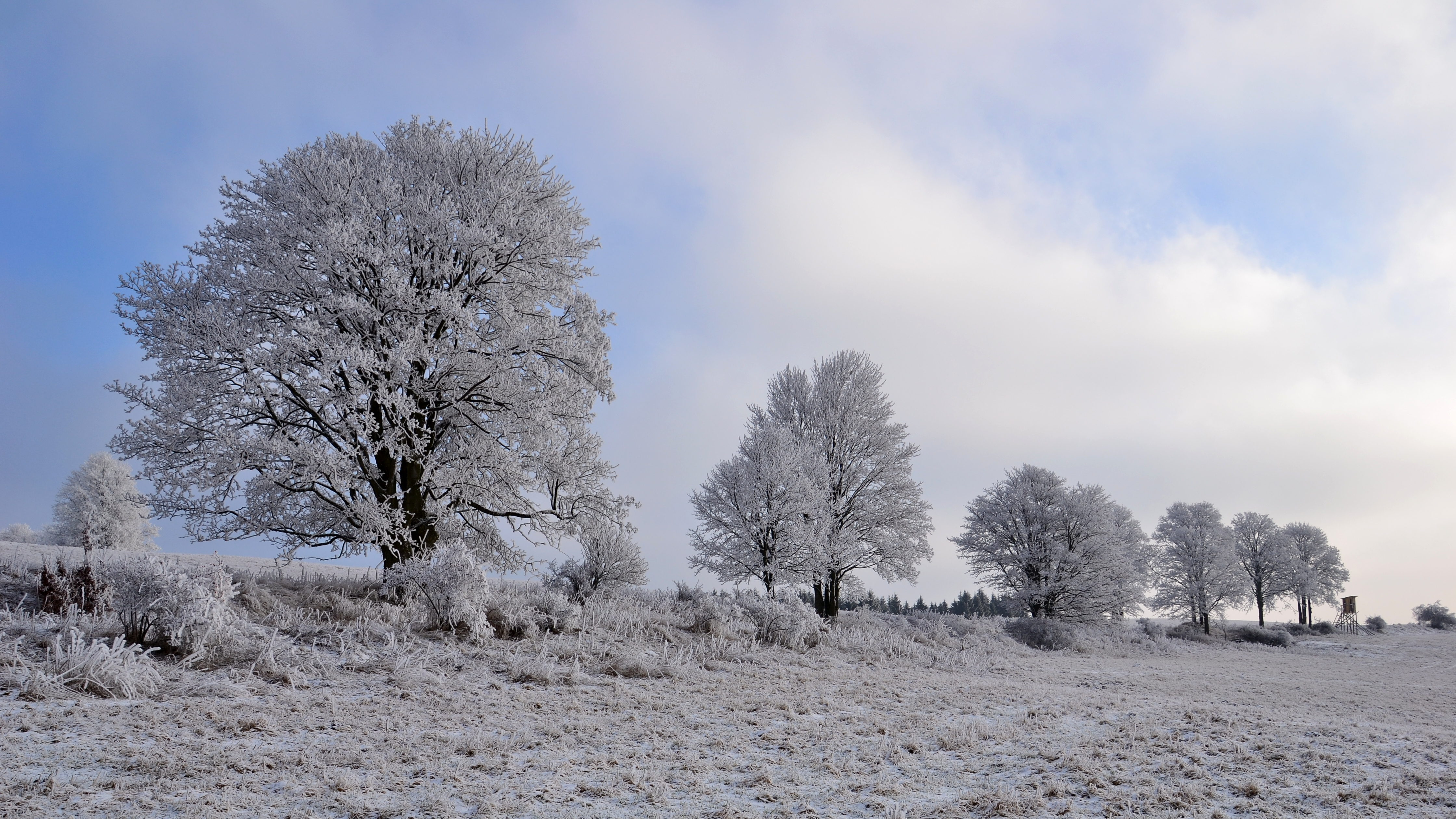 Přírodní park Bezručovo údolí - stromořadí u Menhartic v zimě